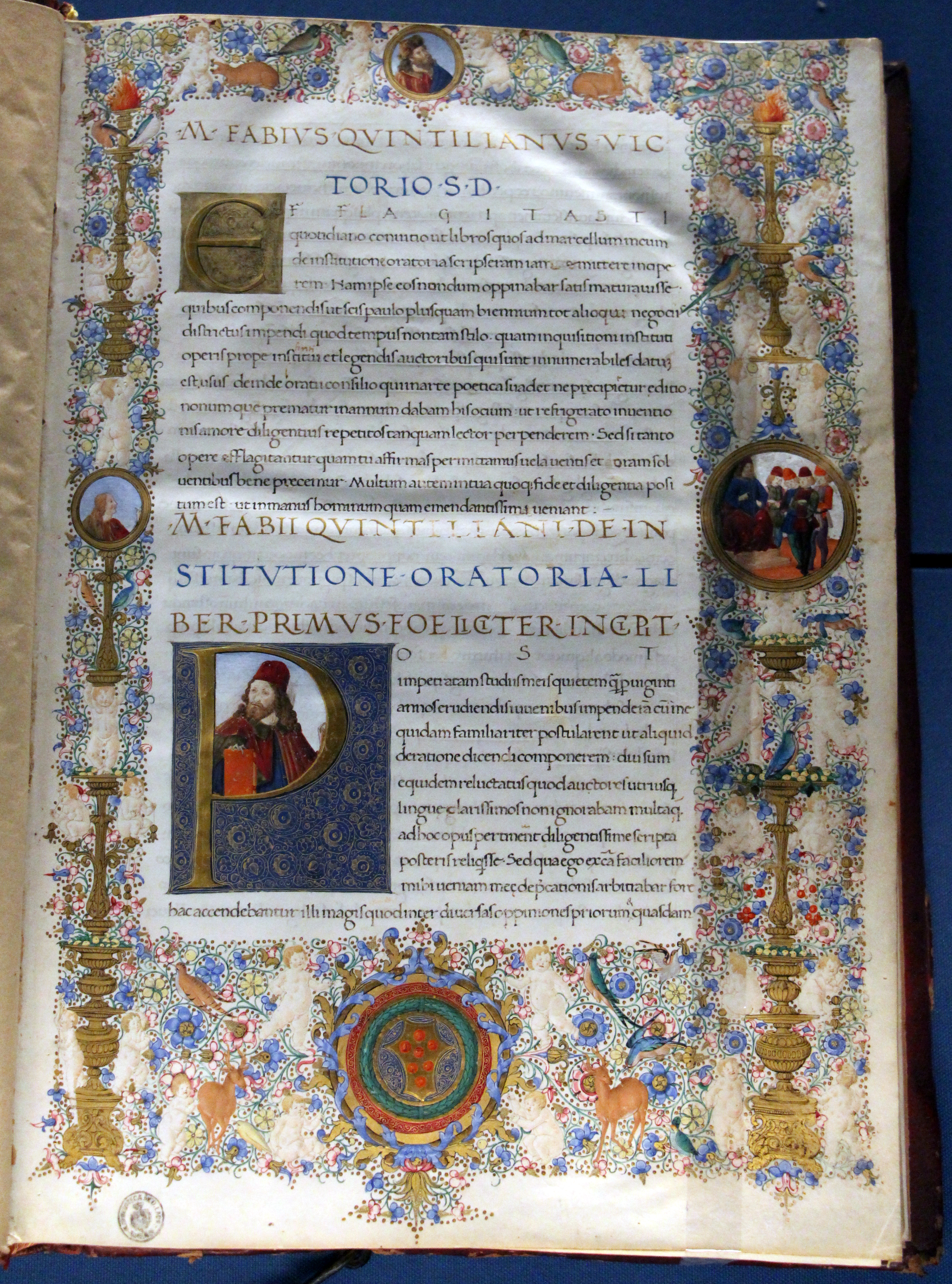 Biblioteca Medicea Laurenziana